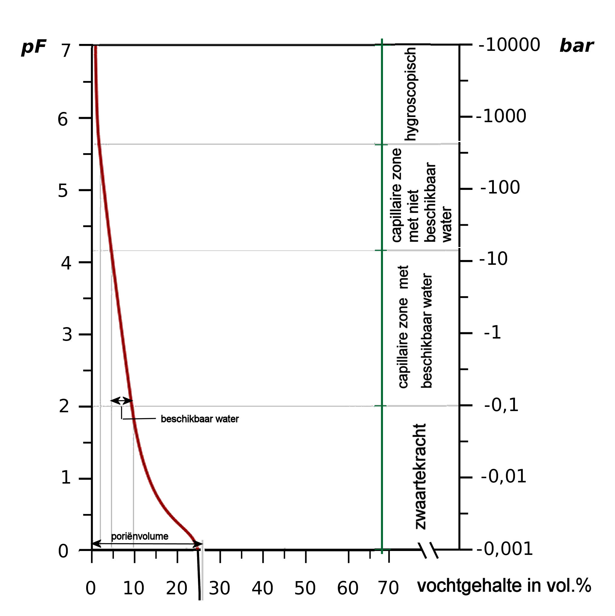 In italiaanse versie nederlandse tekst geplaatst en gespiegeld